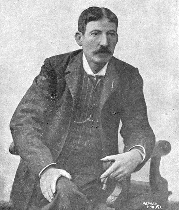 F. TETTAMANCY en La revolución gallega de 1846 (2ª ed. 1909)